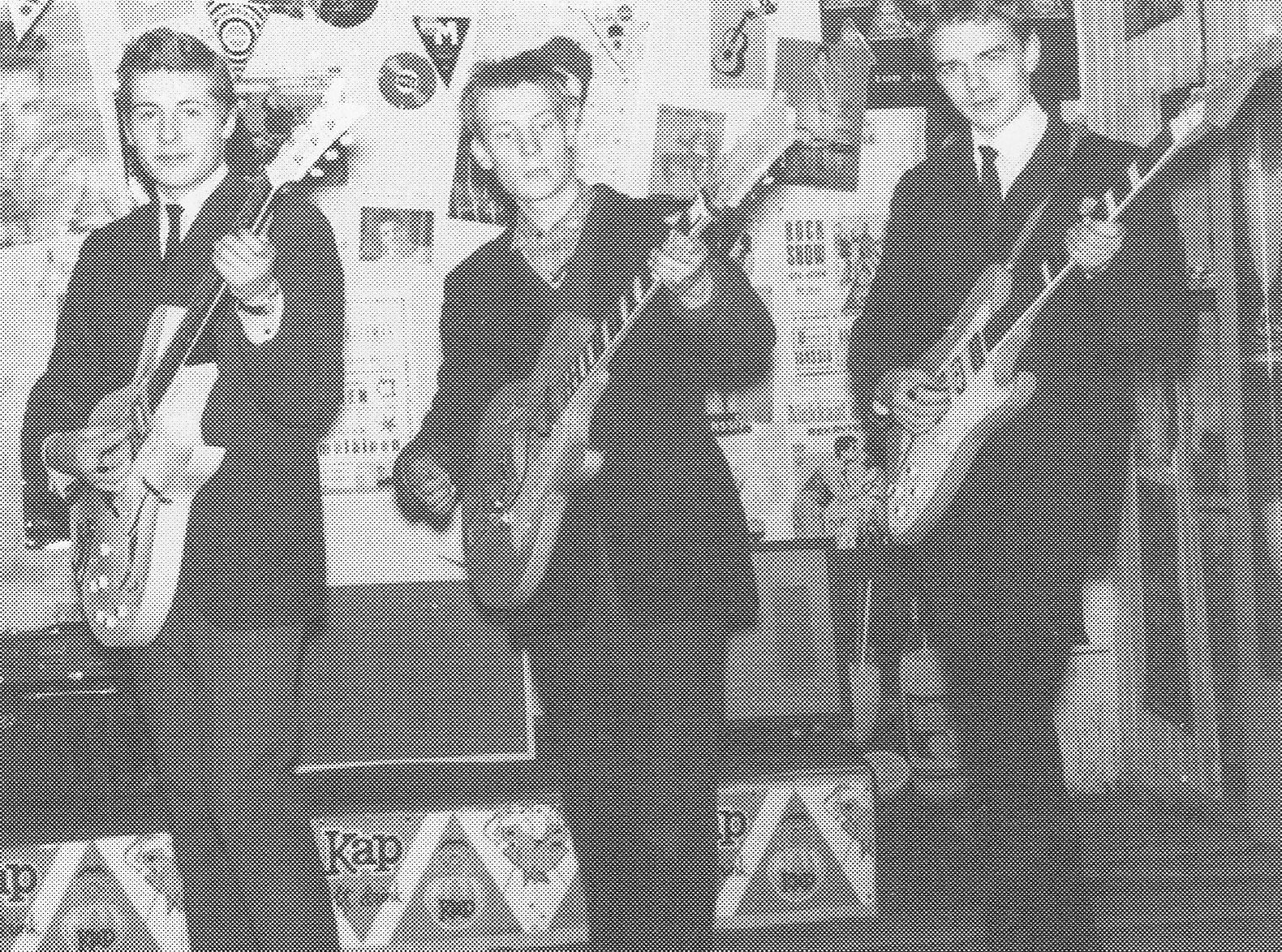 Tommie Mansfield keskellä SOS-rautalankayhtyeen treenikämpillä vuonna 1963